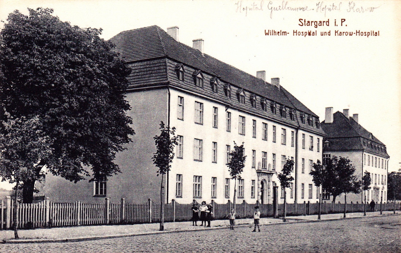 Wilhelm-Hospital und Karow-Hospital